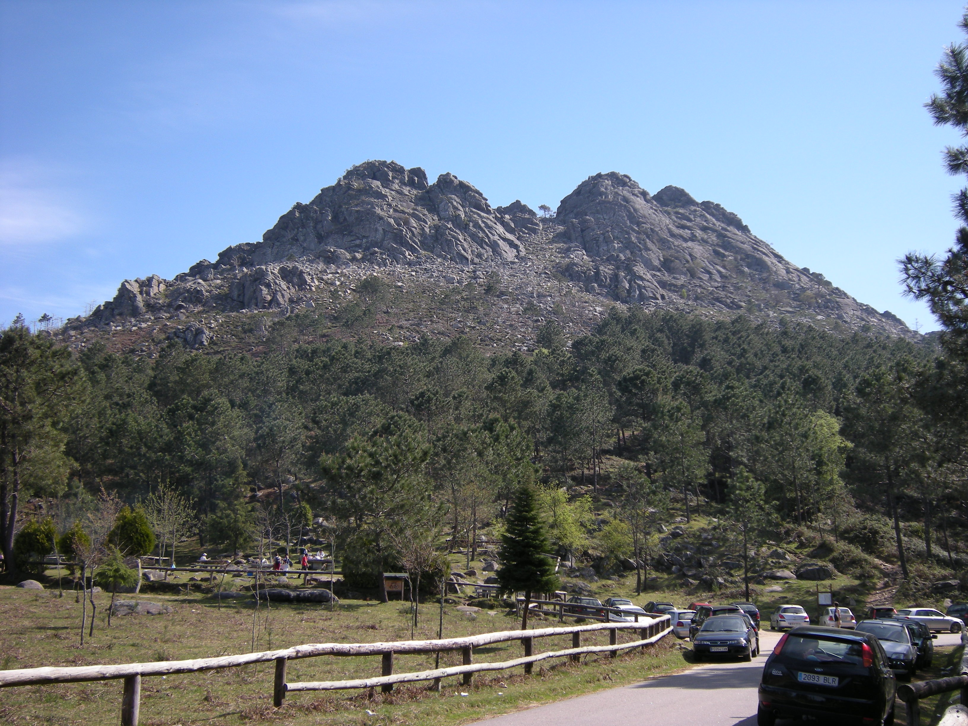 Monte Galiñeiro